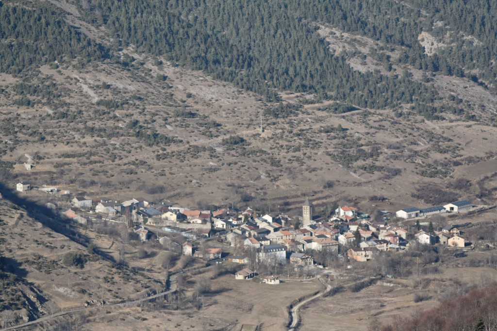 Prades, Ariège, France